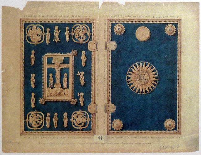 Гессэ І. Малюнак абклада Слуцкага Евангелля. 1866